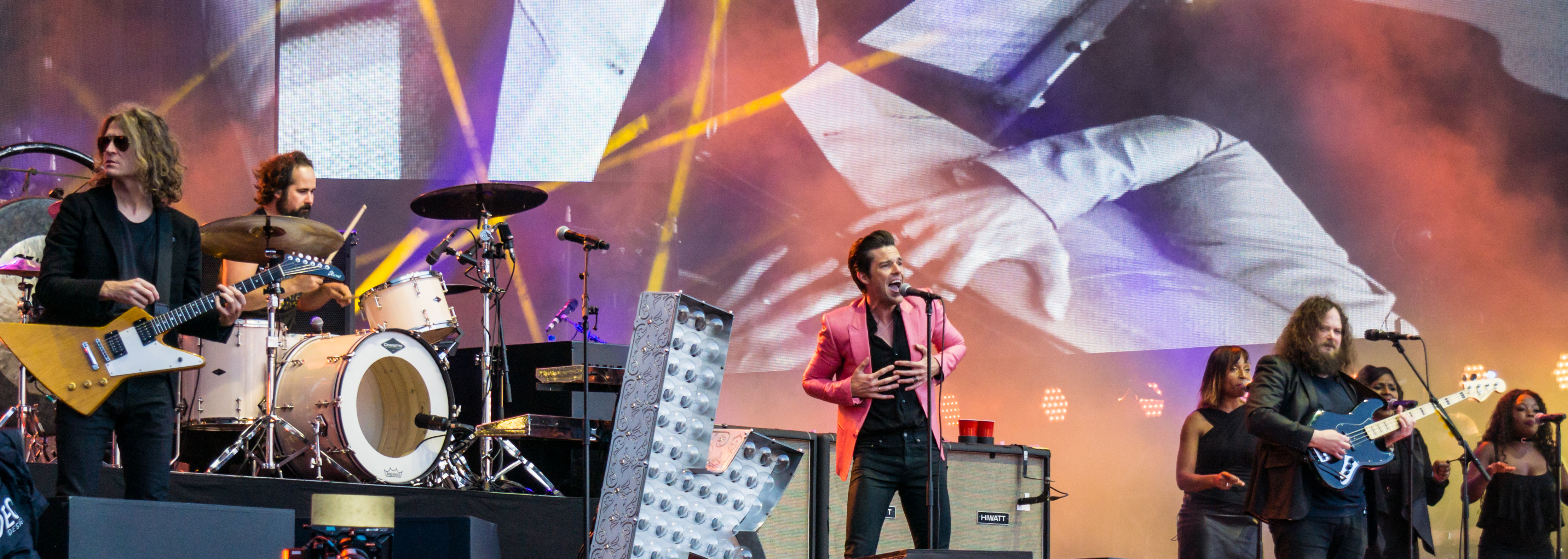 KillersBST080717-38